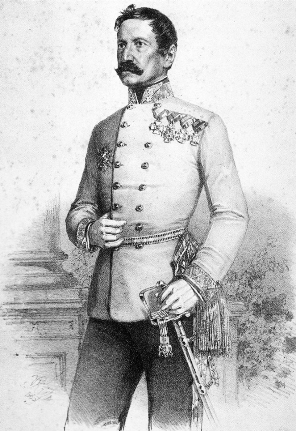 Lazarus Mamula (1795–1878) császári és királyi táborszernagy, az 1848–49-es szabadságharcban a délvidéki harcokban ezredes, a péterváradi ostromsereg parancsnoka. Vincenz Katzler litográfiája, 1853